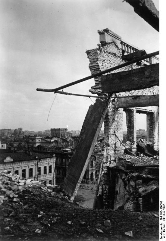 Russland, Kampf um Stalingrad, Zerstörungen Scherl: An der Sowjetfront: Kampf um Stalingrad.- Hart und erbittert wird um jeden Fußbreit Boden gerungen. Ruinen und Mauerreste zeugen von der Unerbittlichkeit dieses Kampfes. PK-Aufnahme: Kriegsberichter Herber (Sch) 6345-42 "Fr.Fr.OKW" Oktober 1942 [Herausgabedatum] ADN-Bildarchiv: II. Weltkrieg 1939-45 An der Front in der Sowjetunion; Oktober 1942. Stalingrad ist weitgehend zerstört durch deutsche Luftangriffe und die schweren Kämpfe. [Sowjetunion.- Schlacht um Stalingrad.- Ruinen zerstörter Gebäude]